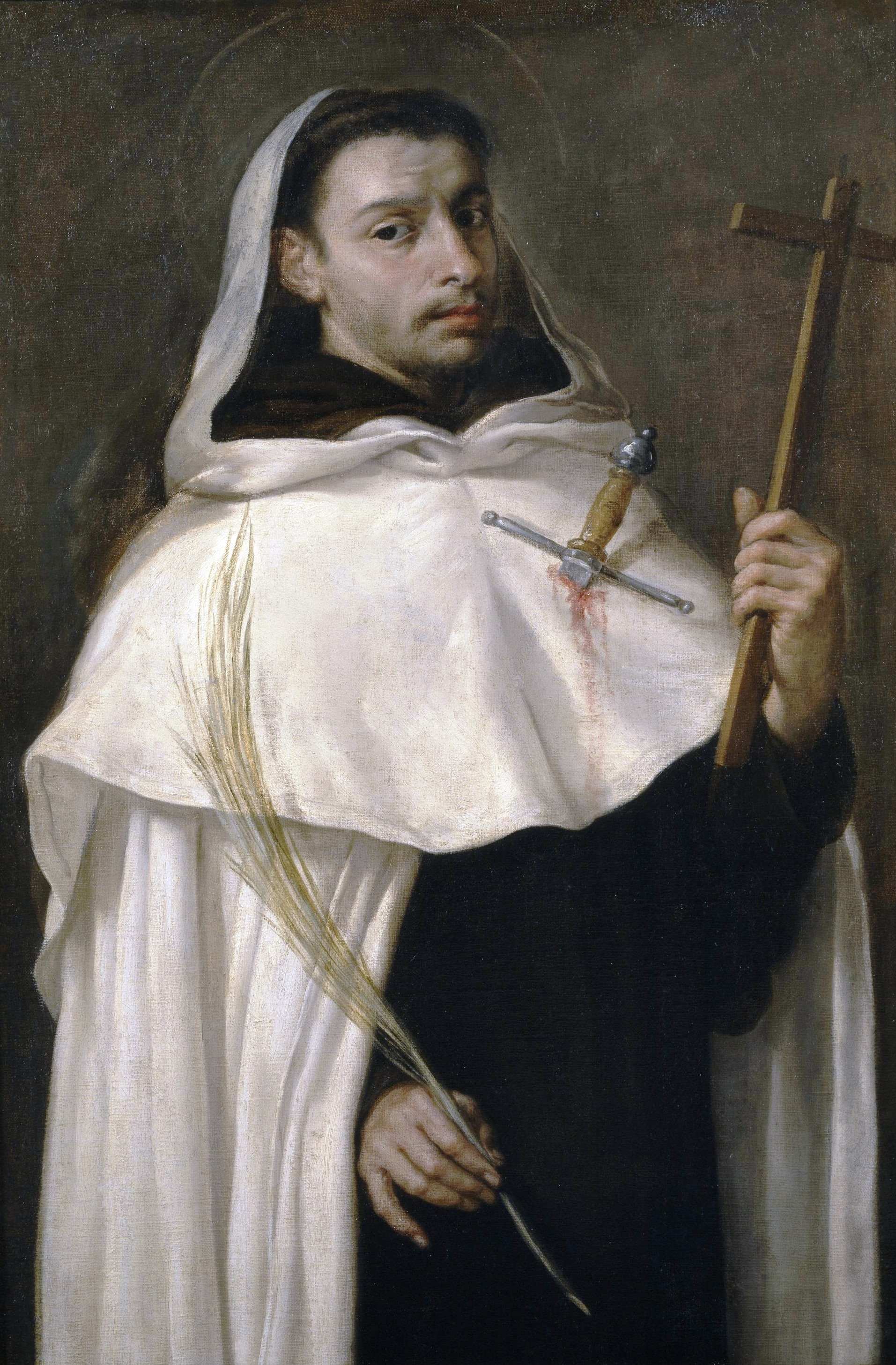 La obra representa al religioso y mártir cristiano San Ángelo (1185-1226), que es conocido también como Ángel de Sicilia.